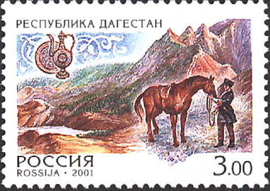 Почтовая марка России